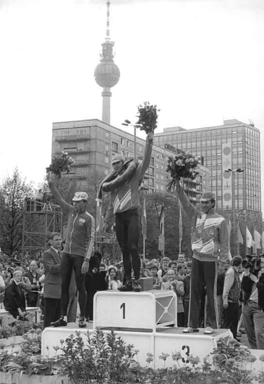 Pjotr Urgrjumow, Wassili Shdanow, Uwe Ampler ADN-ZB Kasper 8.5.87 Berlin: 40. Internationale Friedensfahrt - Prolog: 7-km-Parallelzeitfahren-Den Prolog der Jubiläums-Friedensfahrt in der Berliner Karl-Marx-Allee gewann der 24jährige sowjetische Mannschaftskapitän Wassili Shdanow (M.) in 8:32,4 min vor Straßenweltmeister Uwe Ampler (DDR-1.-8:34,6) und Pjotr Urgrjumow (UdSSR-r..-8:34,8).